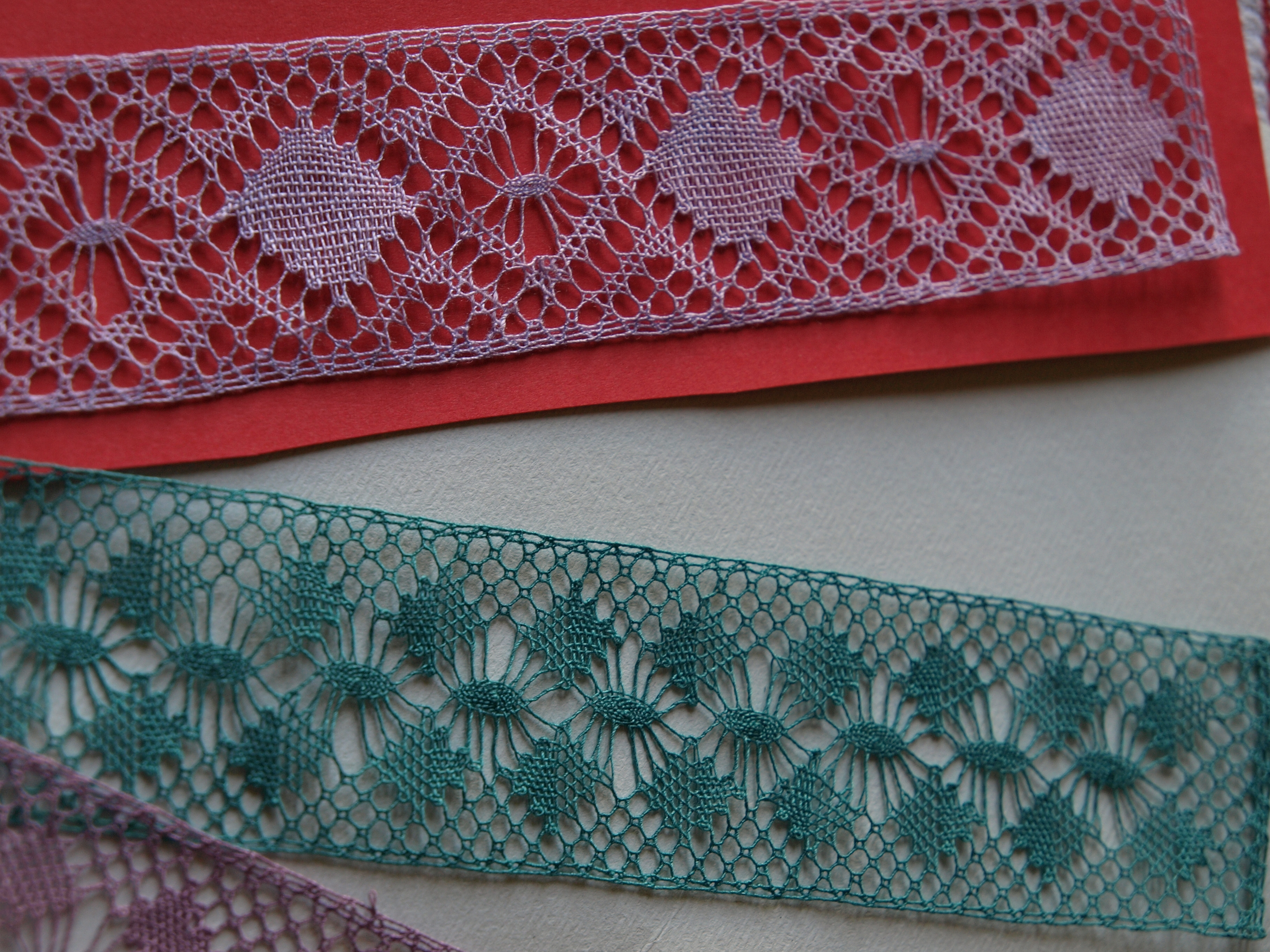 Diferents treballs fets amb Punta de coixí (Boixets)